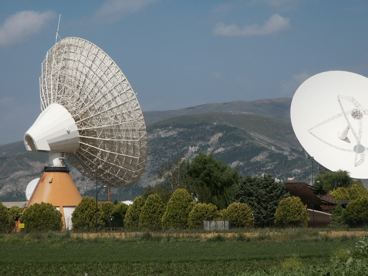 Alveo del Fucino